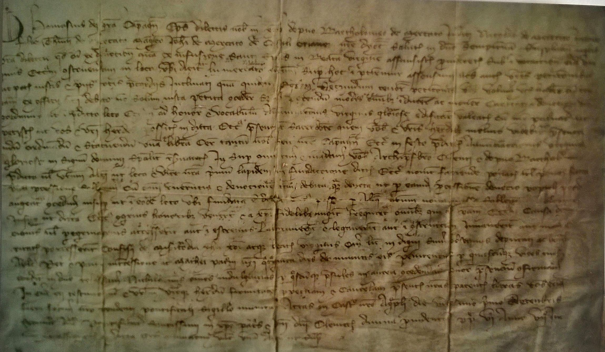 In occasione della Peste Nera i del Mercato edificano la Chiesa con Bolla di Tommaso Santomango del 1348 dotandola di notevoli beni e ottenendone lo juspatronato ovvero il diritto di nominarne i Rettori..